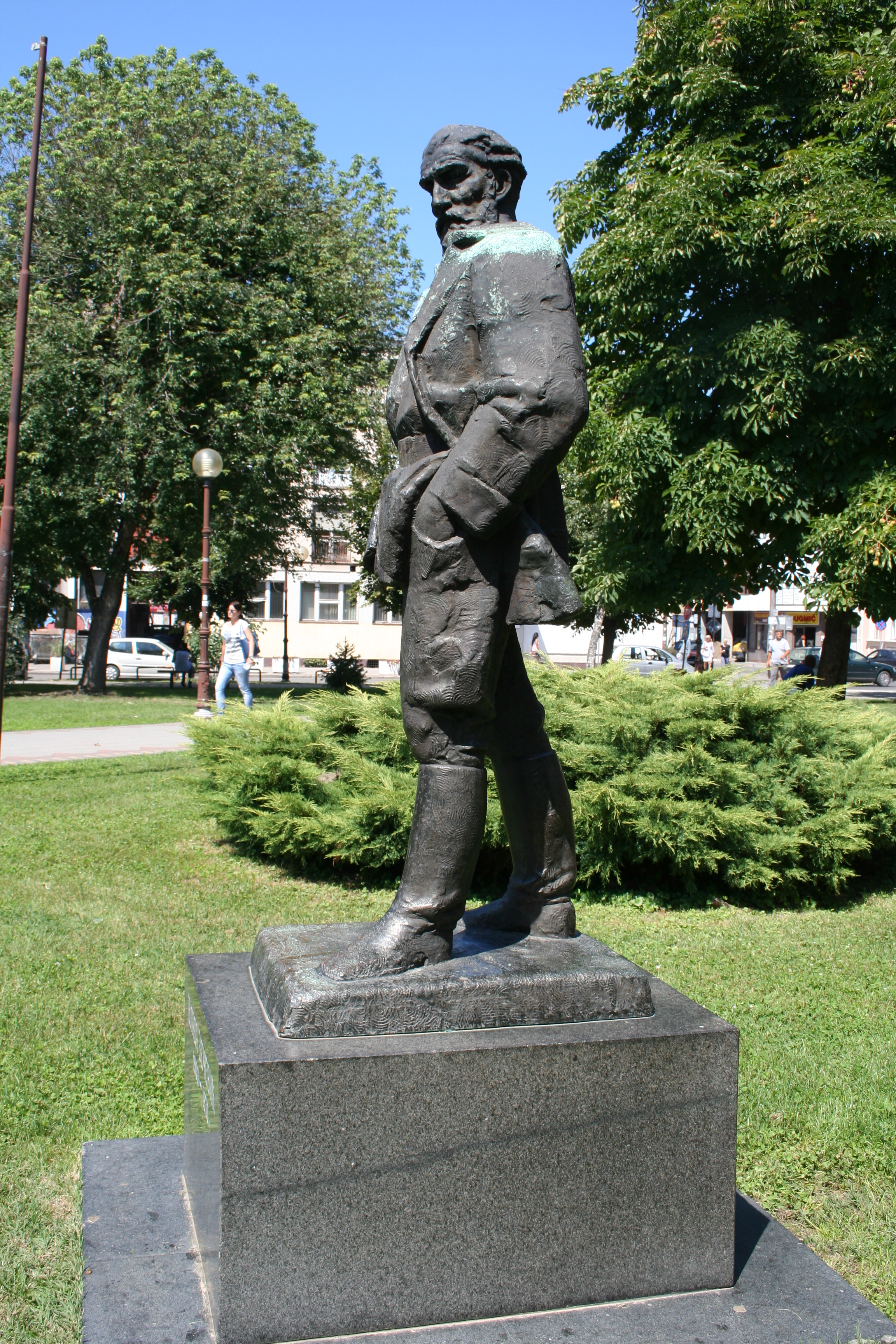 Spomenik popu Vladi Zečeviću, Loznica